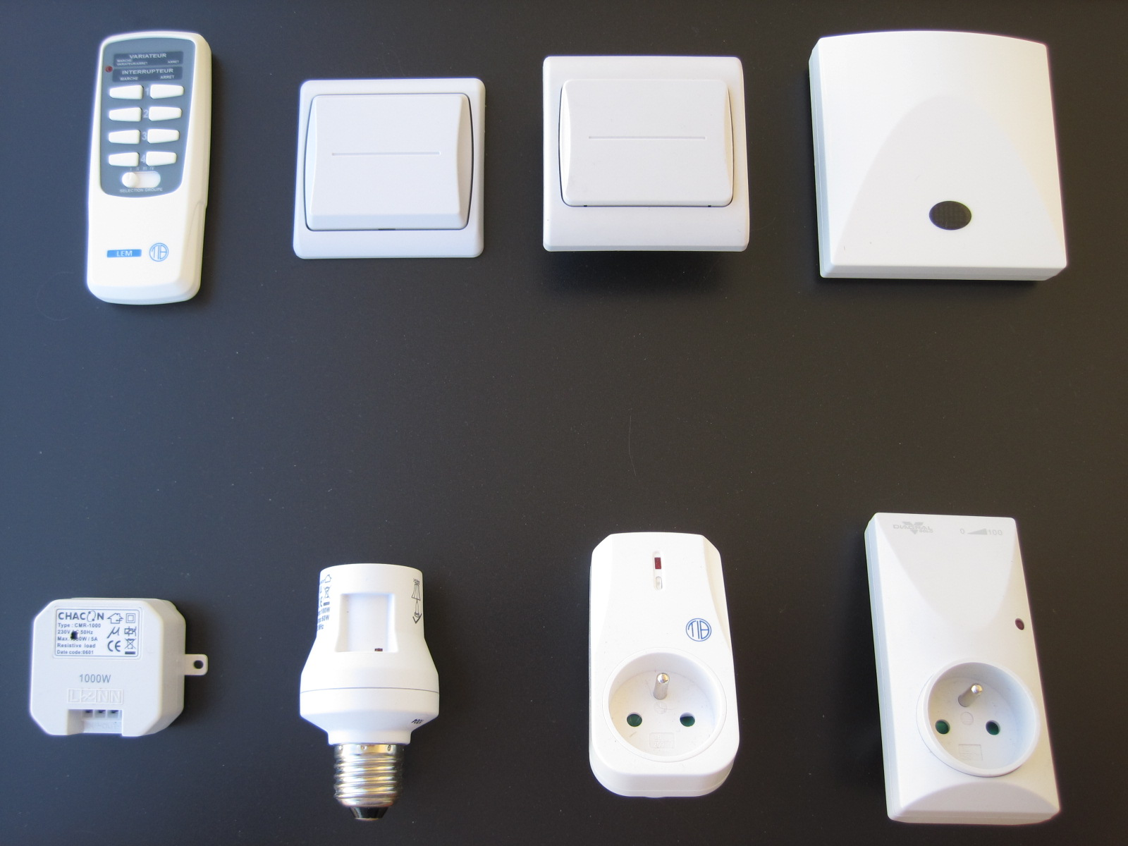 Exemple de modules domotique divers